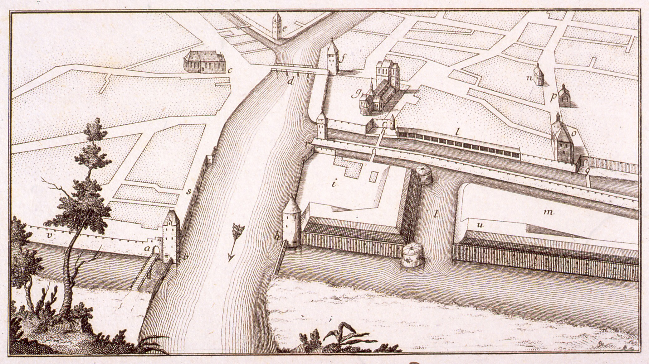 Gravure représentant la porte des pêcheurs à Strasbourg.